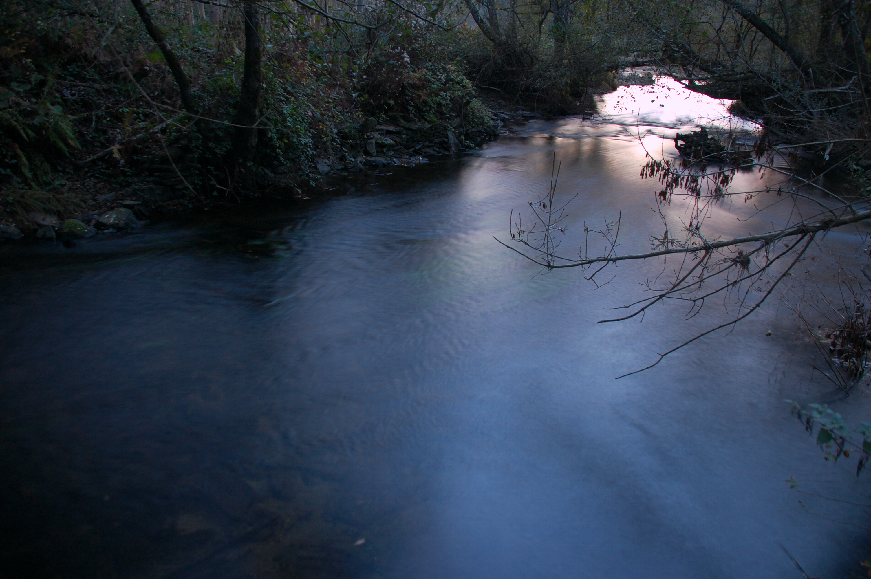 Río chamoso nas proximidades da ponte da Foz, preto da desembocadura no río Miño, entre os concellos de Lugo e O Corgo